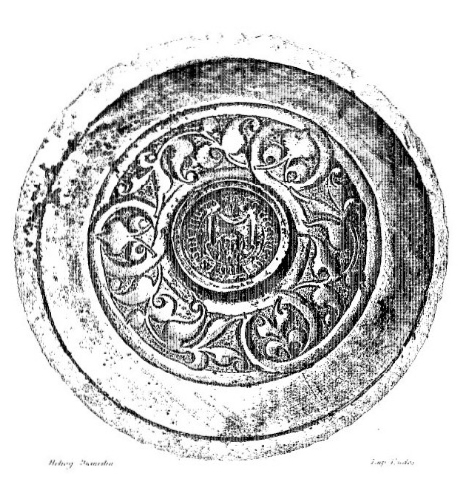 Le vase découvert à Plomelin en 1875 (servant à la communion sous l'espèce du vin), dessin sculpté sur le bouton du vase (photographie de Paul du Chatellier)